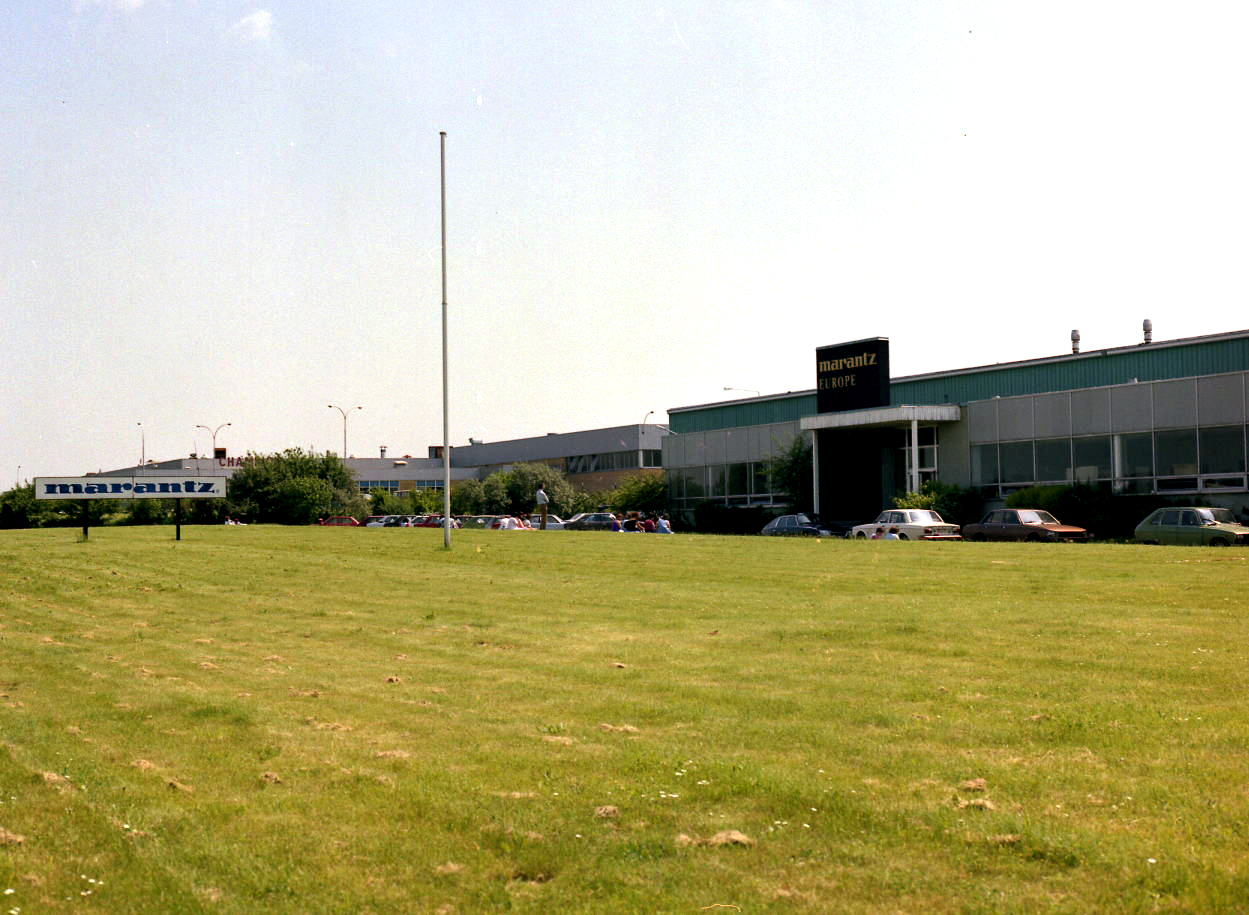 Usine Marantz Europe à Peronnes-lez-Binche (Belgique)